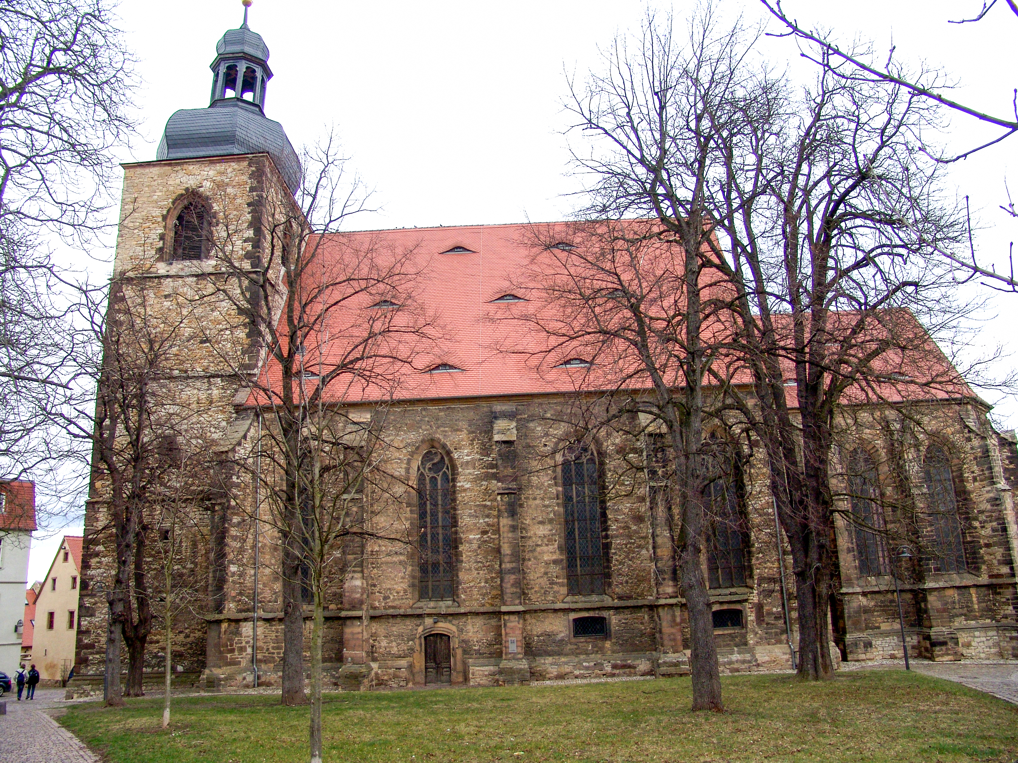 Pfarrkirche in Querfurt